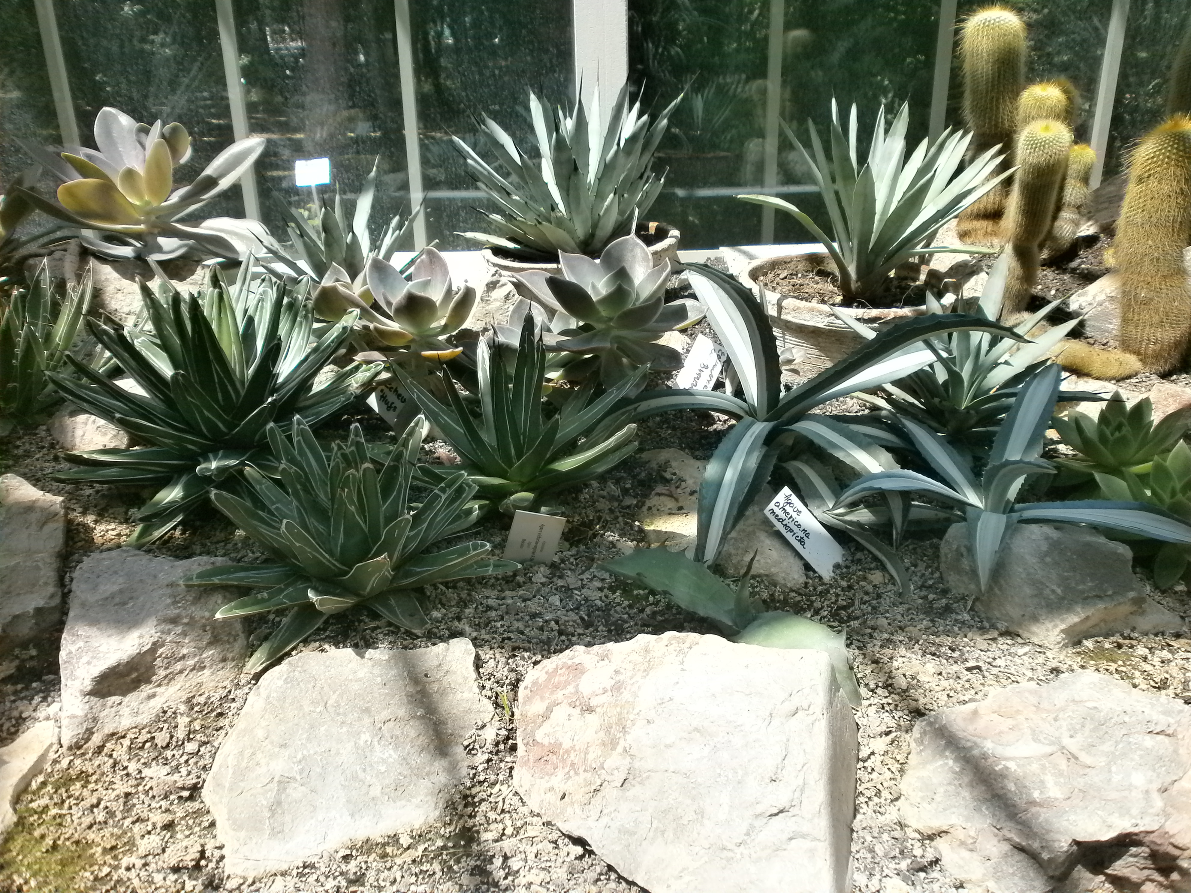 Botanička bašta Jevremovac u Beogradu. Ово је фотографија заштићеног природног добра у Србији под шифром: СП005 This is a a photo of a natural area in Serbia with ID: СП005